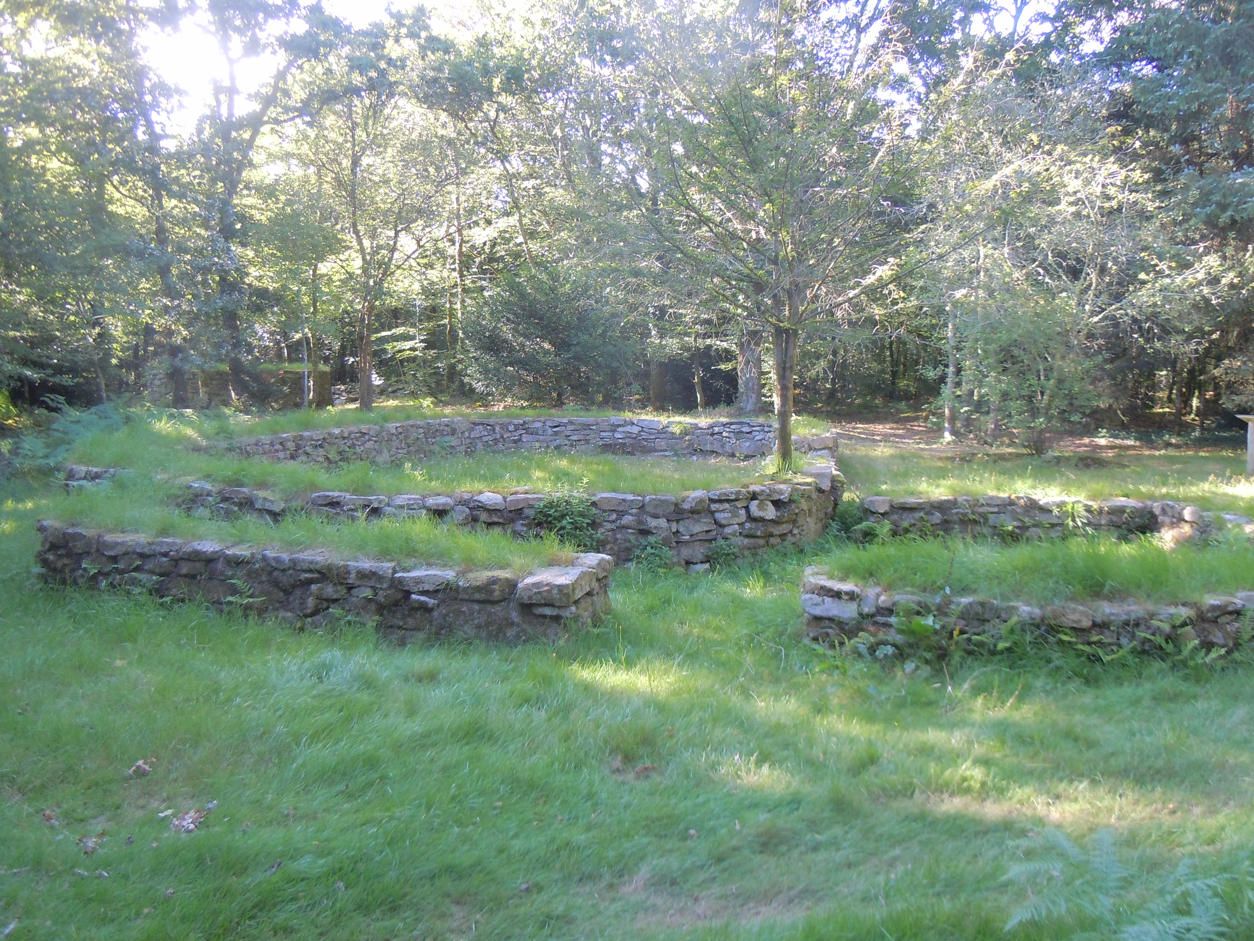 vestiges d'habitations du village archéologique de Pontcallec à Berné dans le département du Morbihan